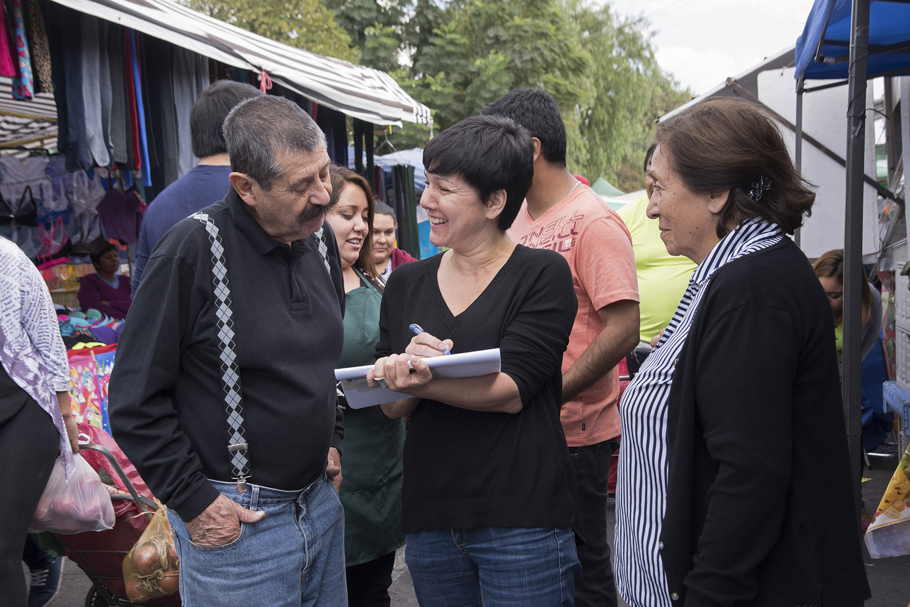 Javiera Parada